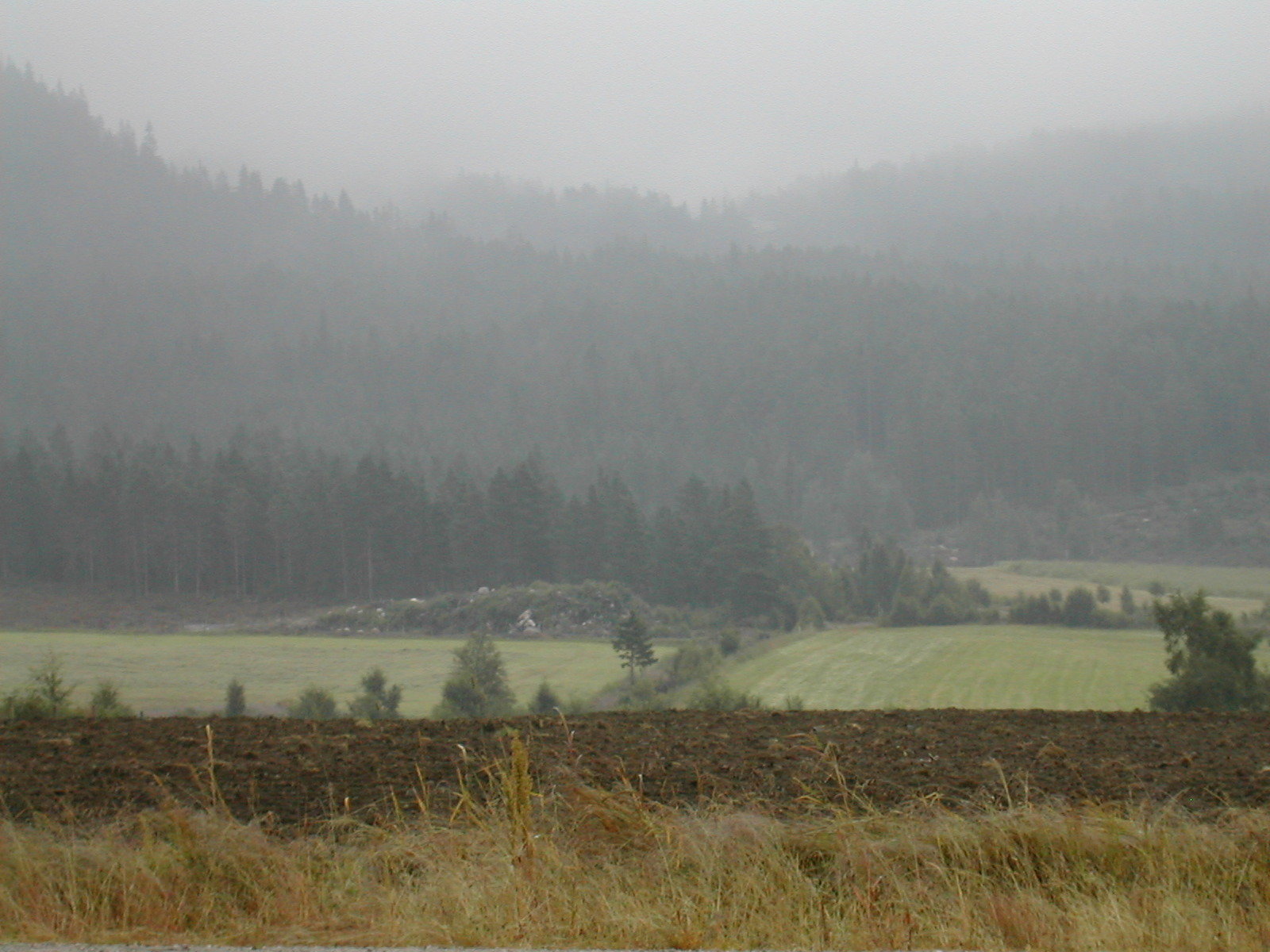 Åraksbø in Setesdalen, Norway. (Bygland).